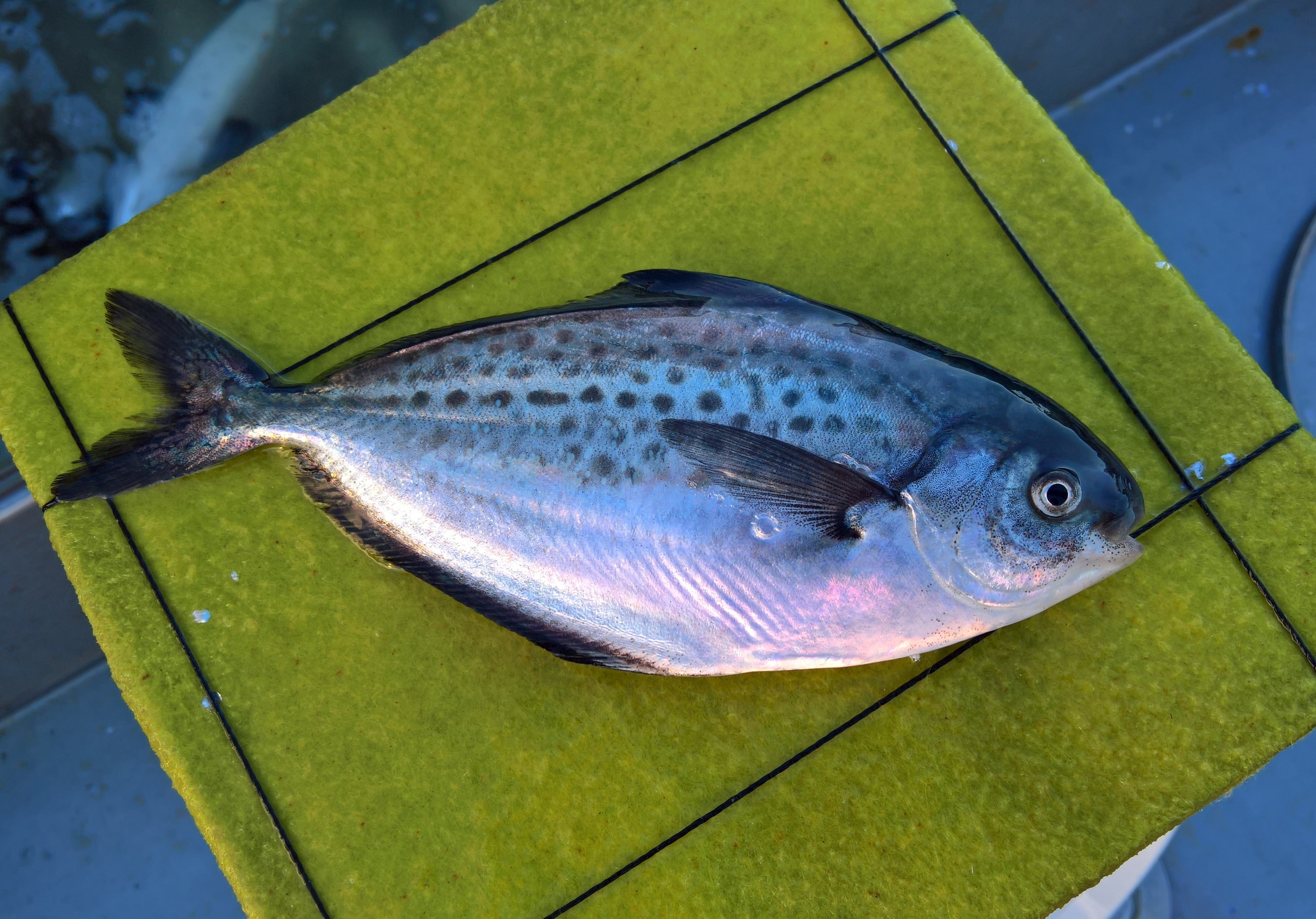 Pez no comestible debido a las toxinas que posee en su piel y musculo